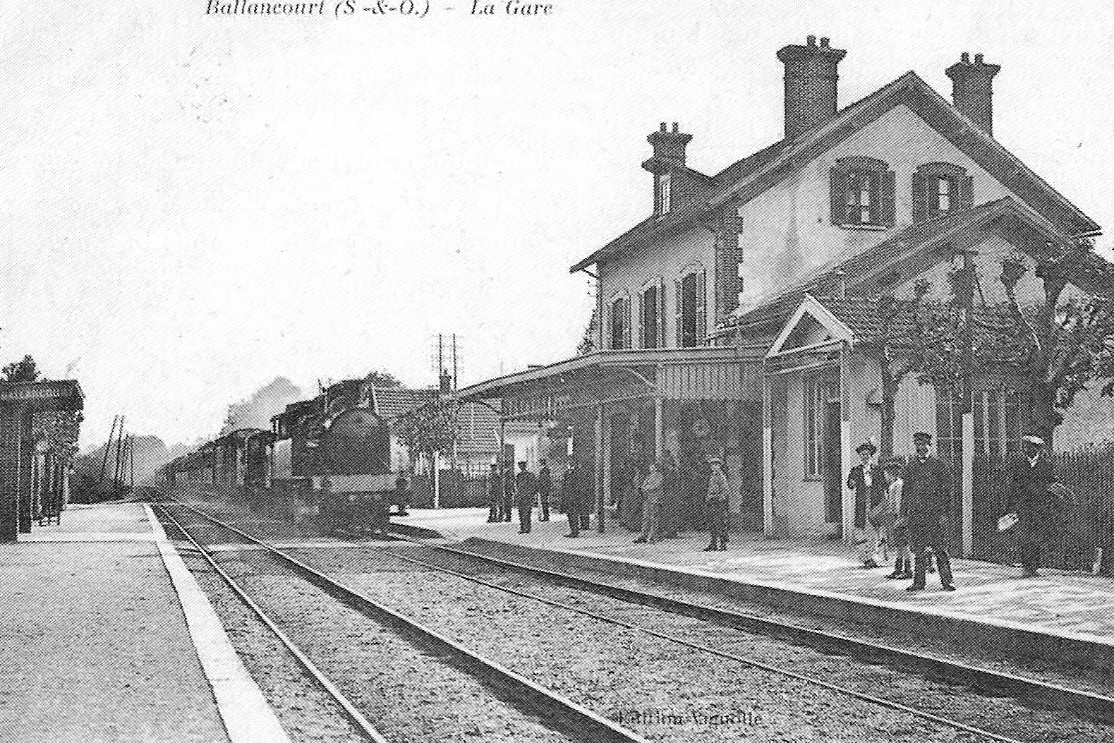 La gare de Ballancourt (Essonne, France), au début du XX° siècle.